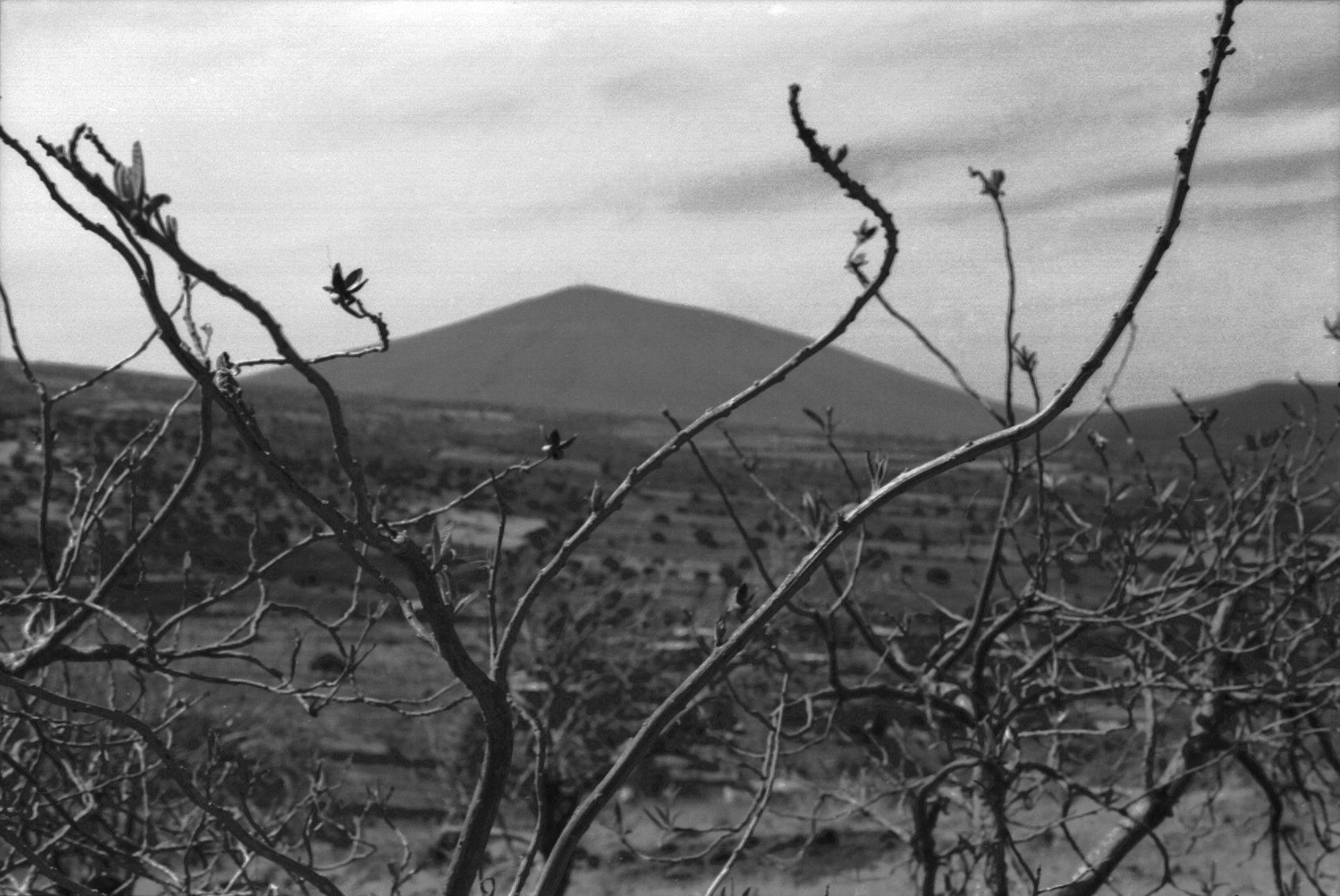 Cerro de Culiacán, anteriormente llamado Teoculhuacan.